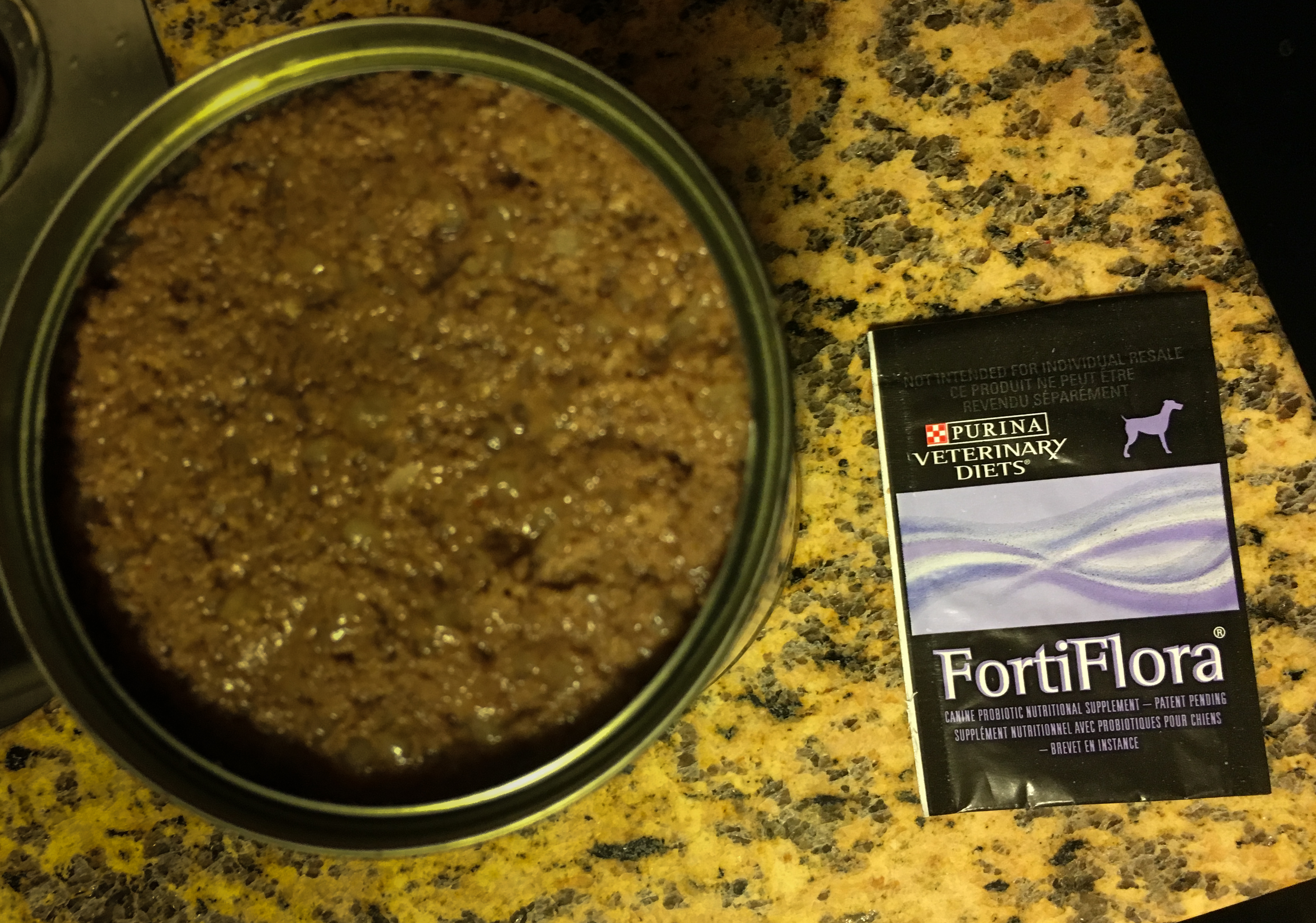 Purina